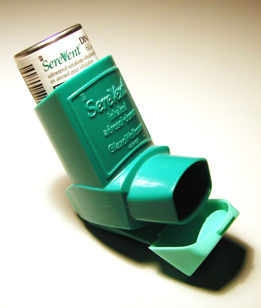 An asthma inhaler (SereVent (salmeterol), no longer on market).